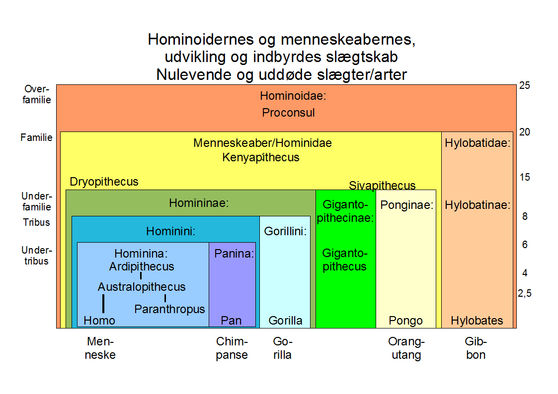 Figur: Hominoidernes/Menneskeabernes slægtskab og udvikling